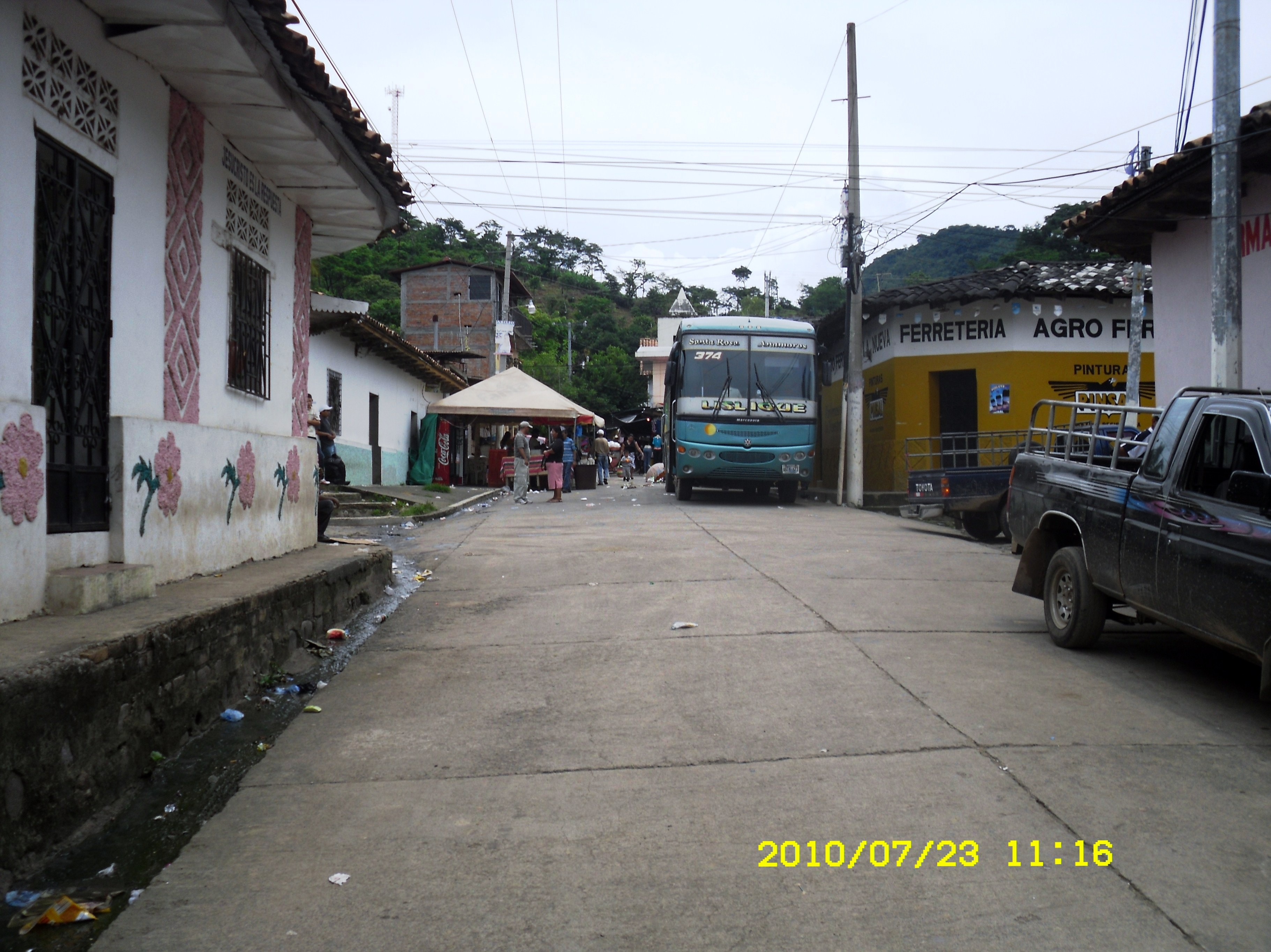 Lislique, El Salvador